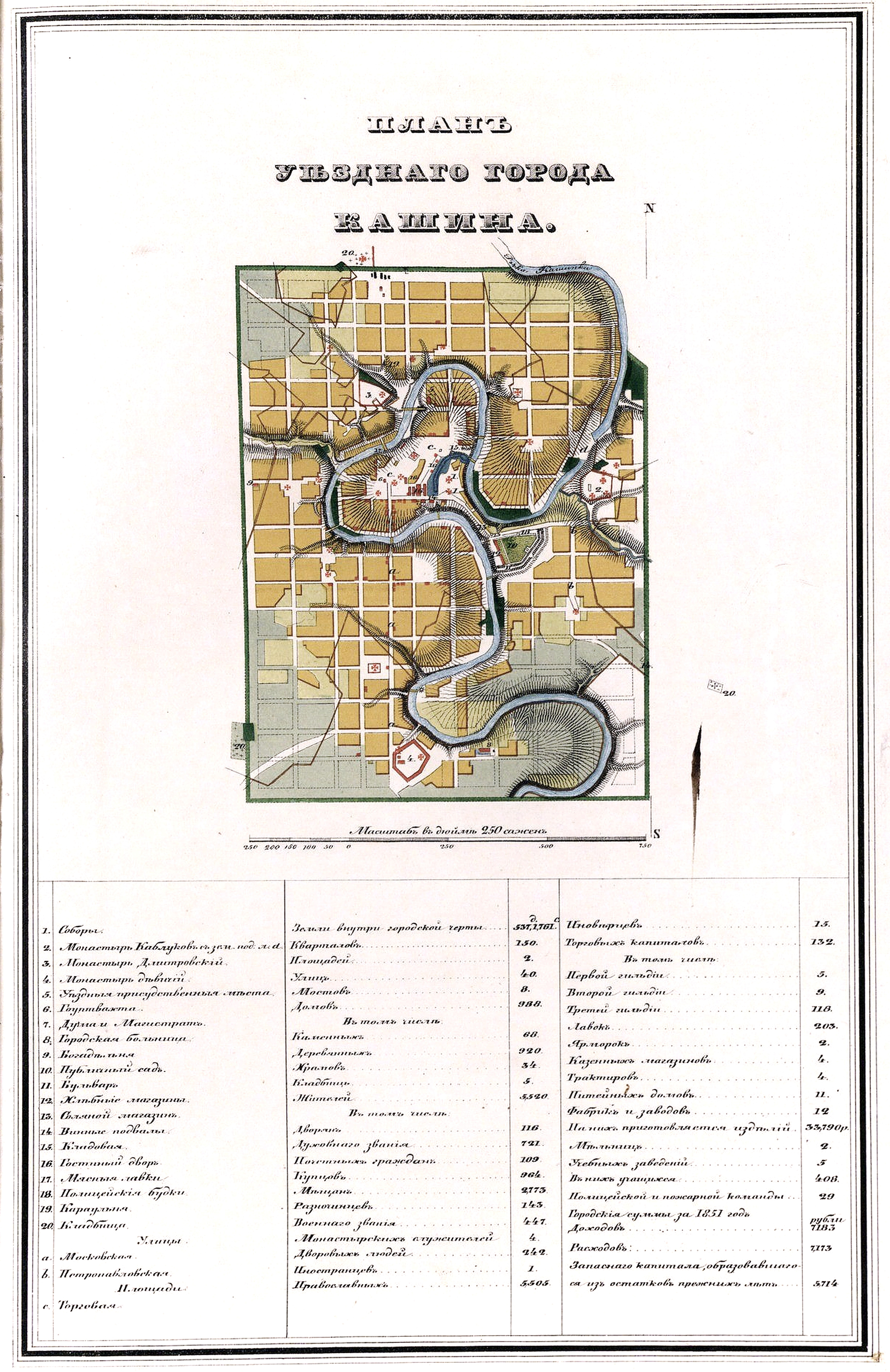 План уездного города Кашина.